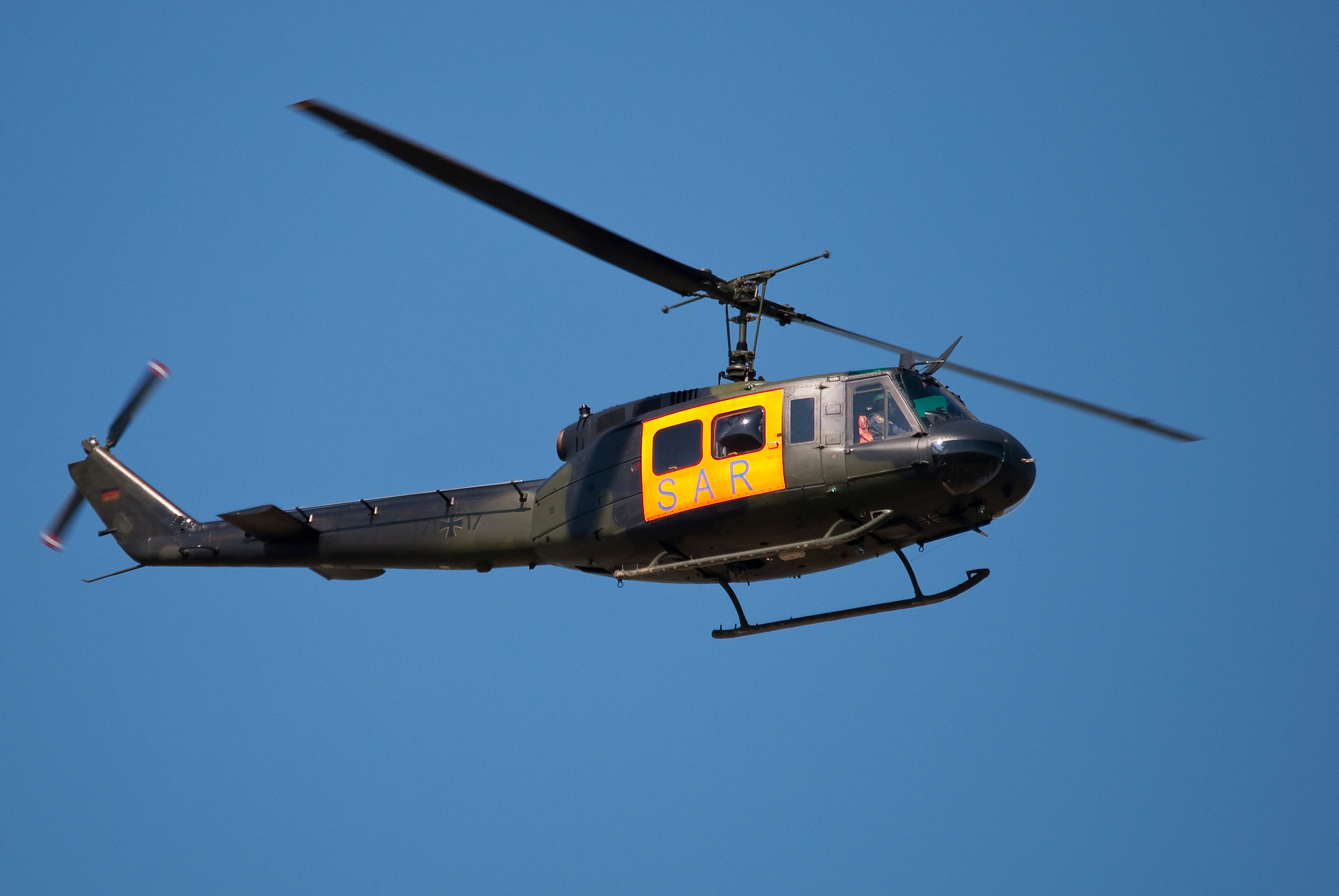 imx00000012